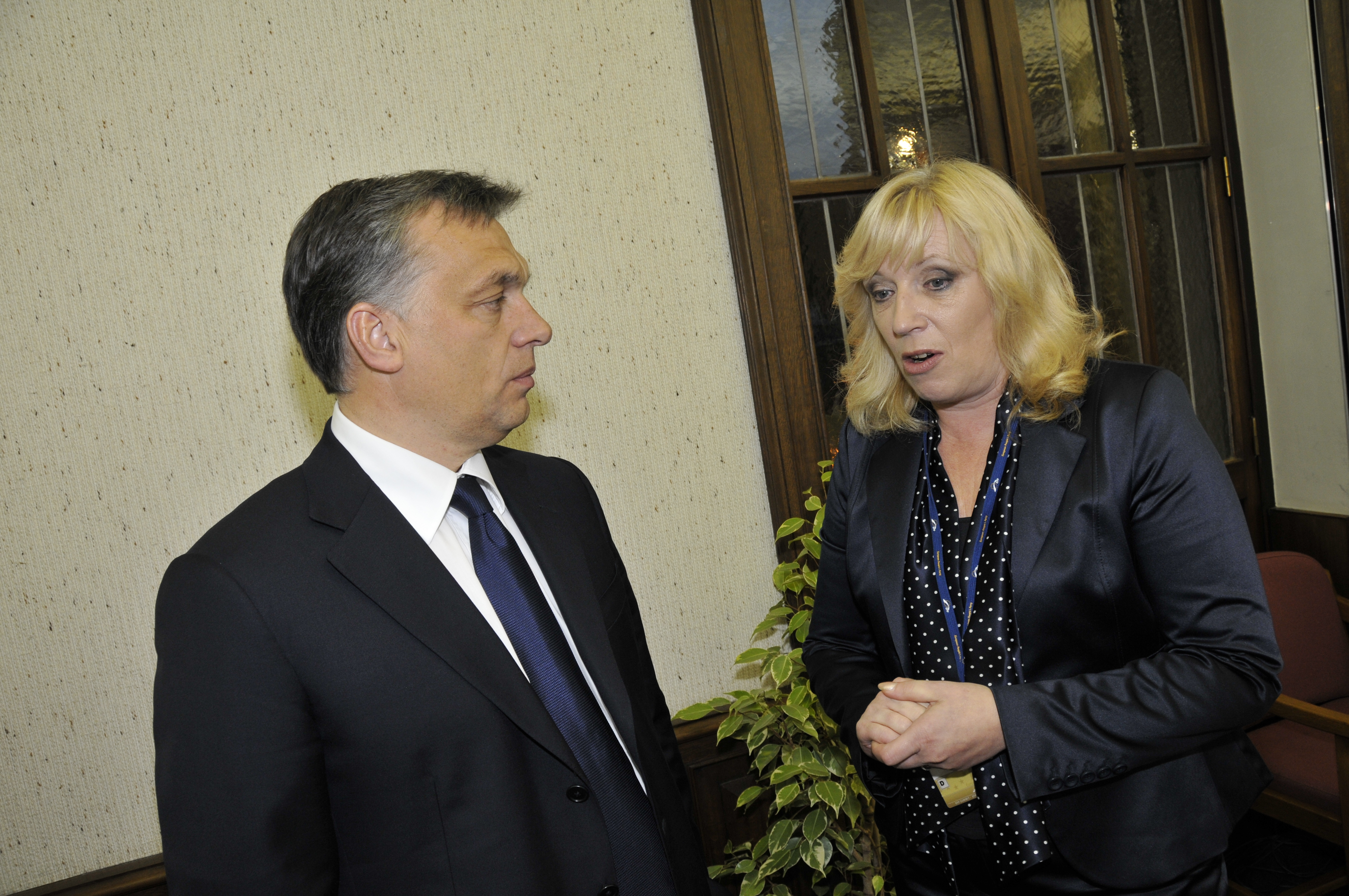 EPP Summit September 2010